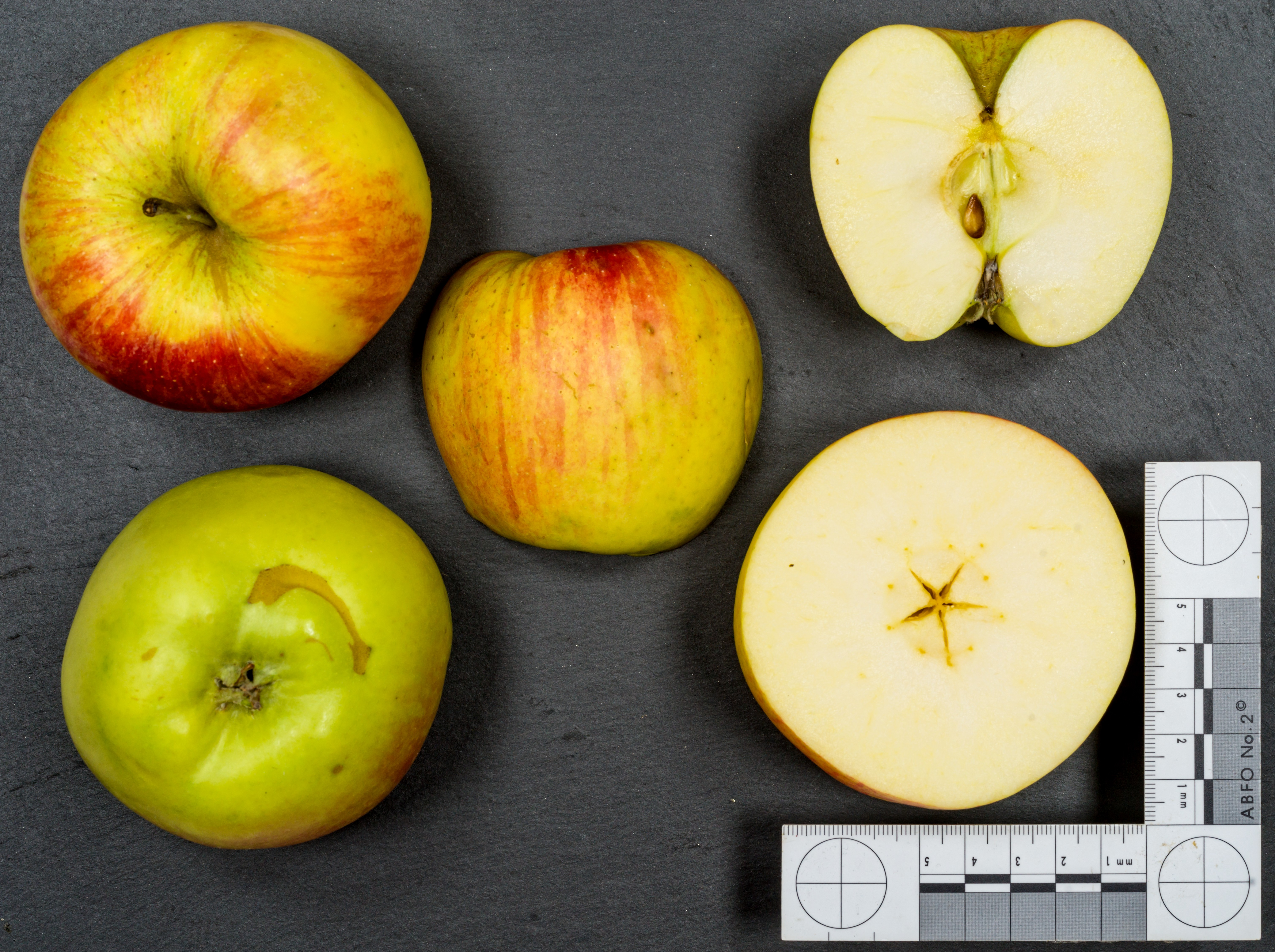 Apfelsorte: Delbarestivale, Delba, Delbarest oder Delbar